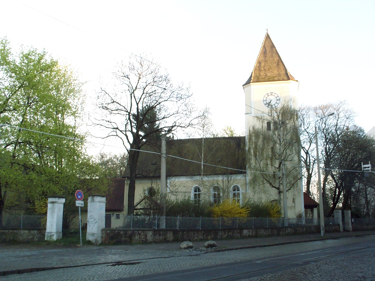 Stephanuskirche in Leipzig Mockau, Kieler Straße (Deutschland, Sachsen)